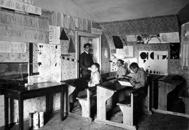 Занятие в школе Рукавишниковского приюта